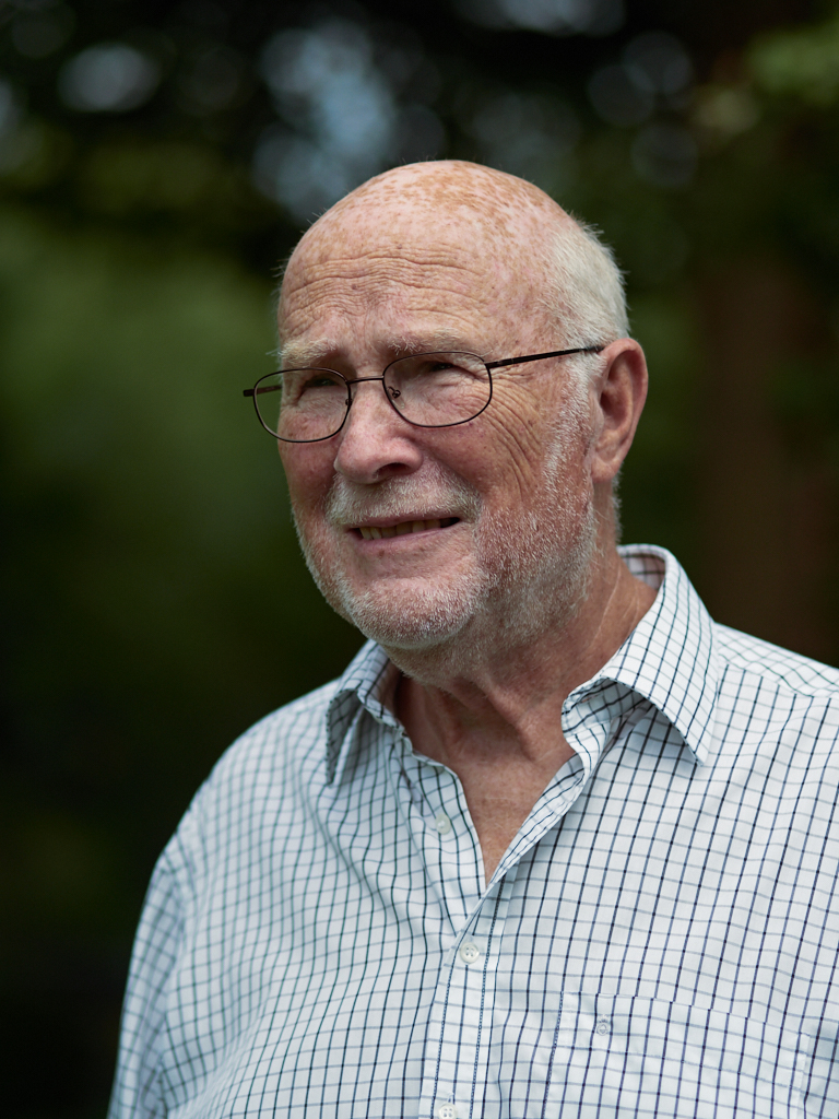 Portraitshooting mit Prof. Dr. Wills